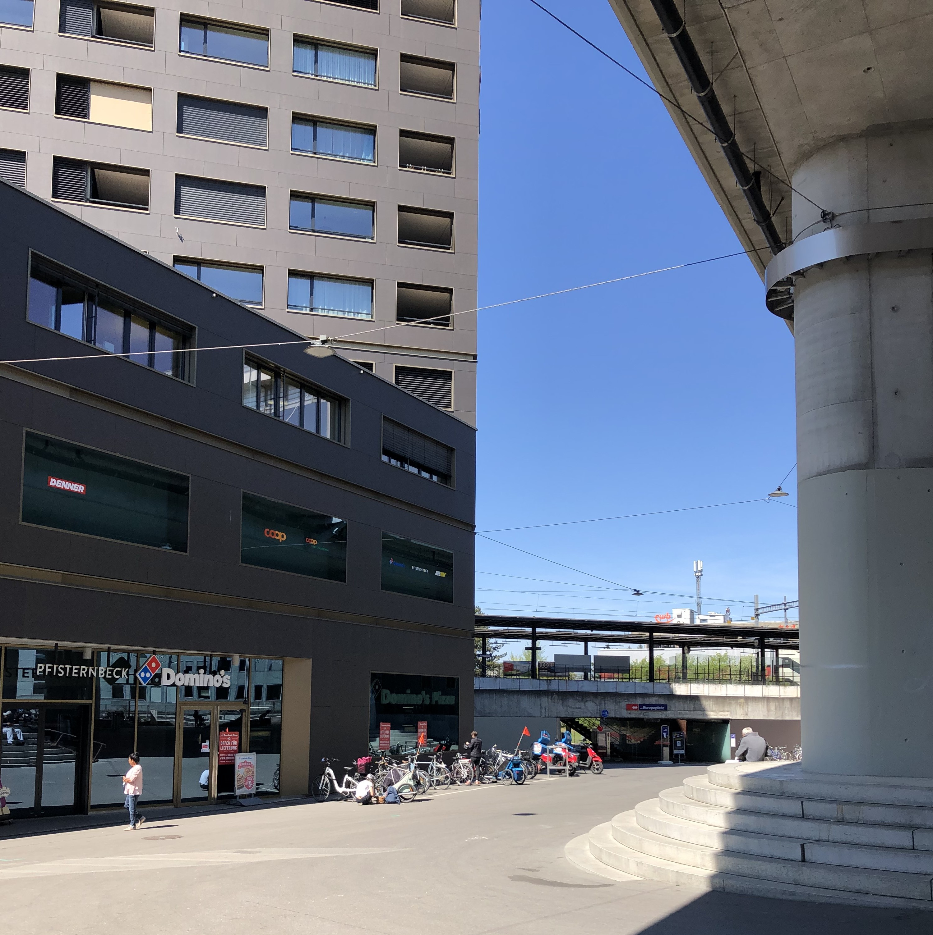 Europaplatz Bahnhof